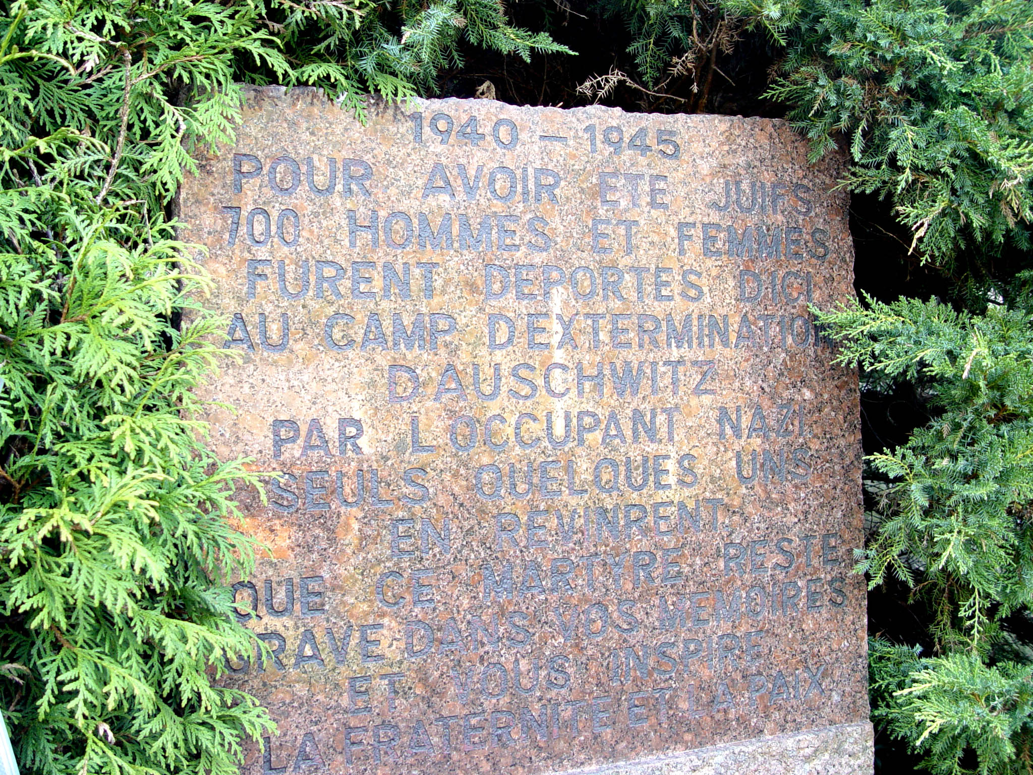 Commemoratiounsplack op der Pafemillen. Kategorie:Gemeng Ëlwen Kategorie:Gemeng Wëntger